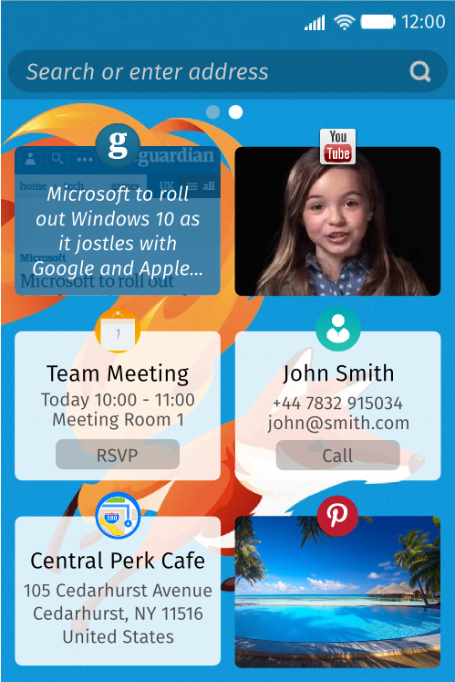 Версия 2.5, в которой появилась возможность прикреплять различные ярлыки на домашний экран